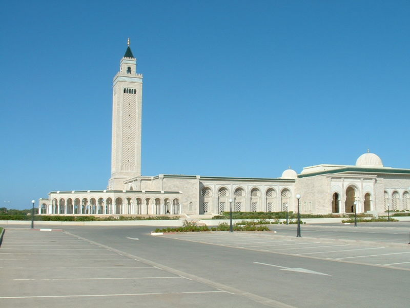 Photographie personnelle prise à Carthage (Tunisie). Vue principale de la mosquée